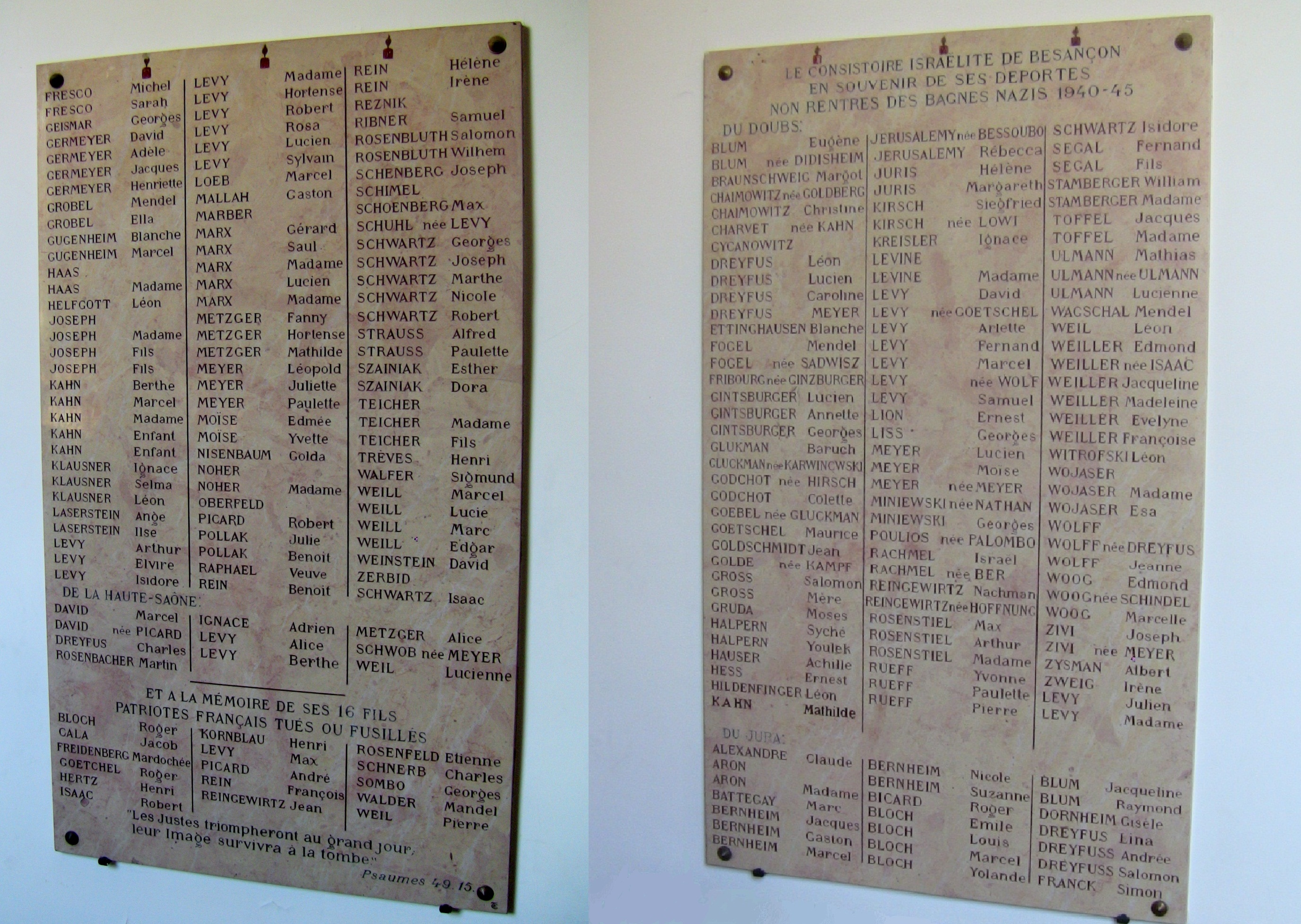 Montage à partir de File:Synagogue de Besançon - plaque 1.jpg et File:Synagogue de Besançon - plaque 2.jpg.